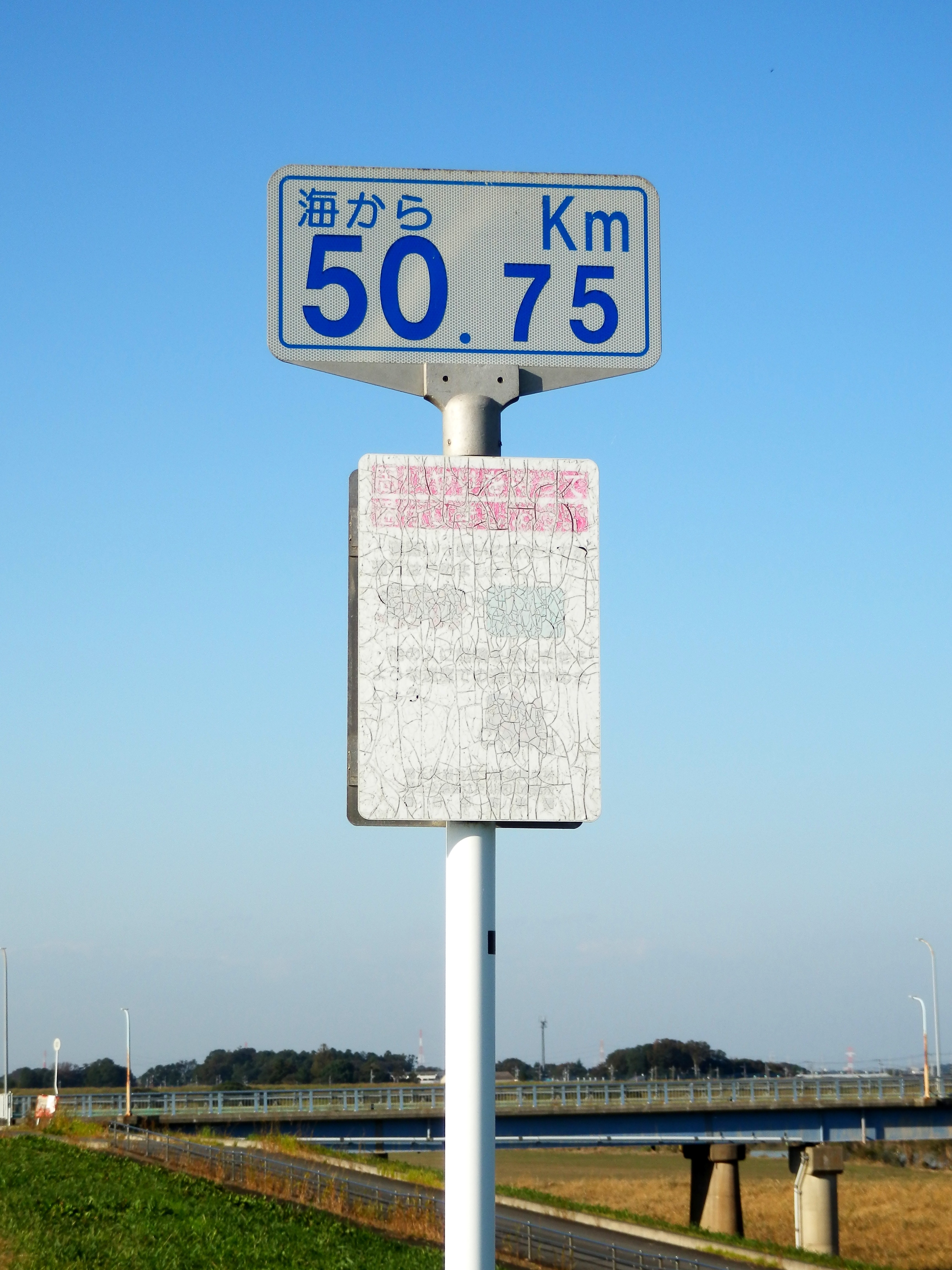 江戸川河口からの距離標・埼玉県春日部市西宝珠花：宝珠花橋付近